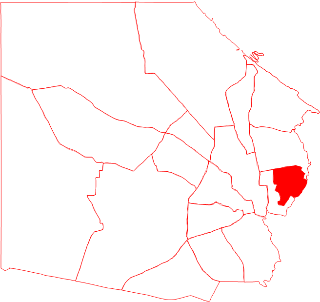 Ubicación de la parroquia Santa Lucía, municipio Maracaibo, estado Zulia, Venezuela